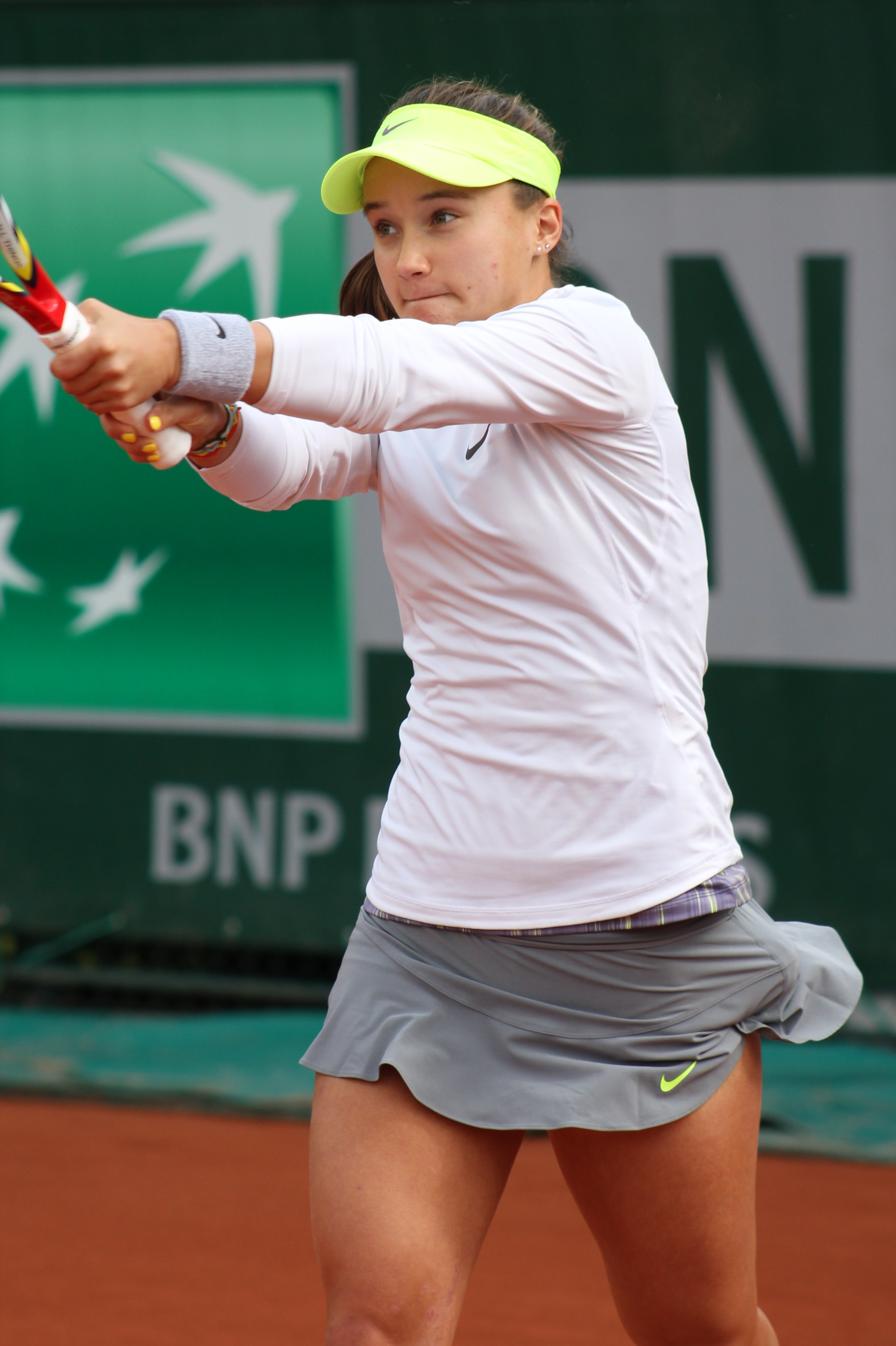 Lauren Davis